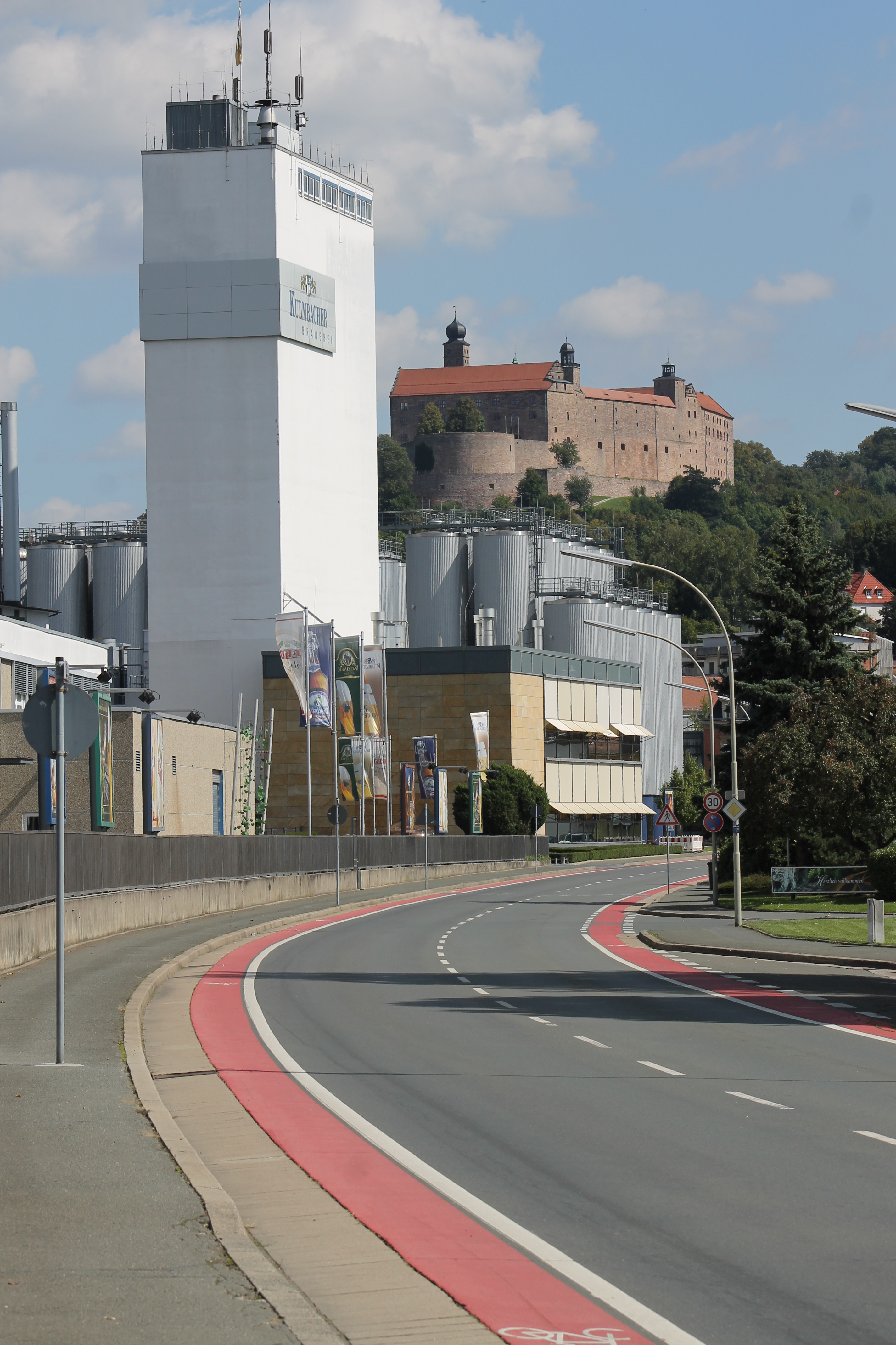 Kulmbacher Brauerei und Plassenburg